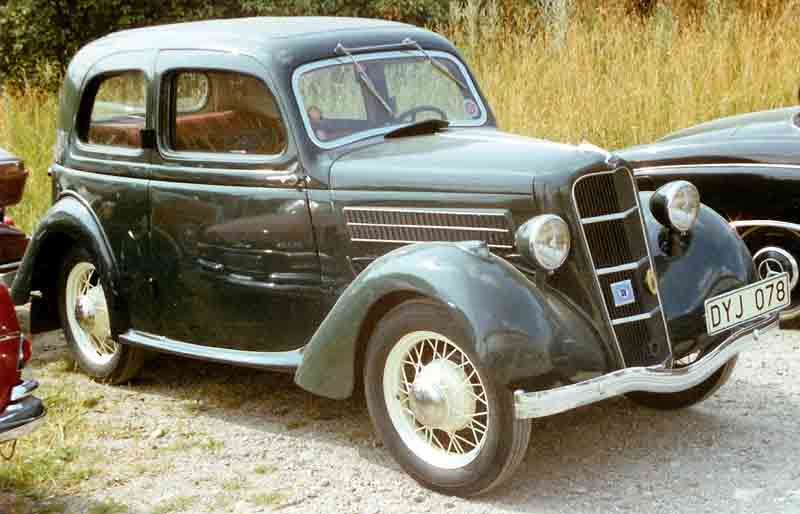 Ford Model C Junior De Luxe Tudor Saloon 1936